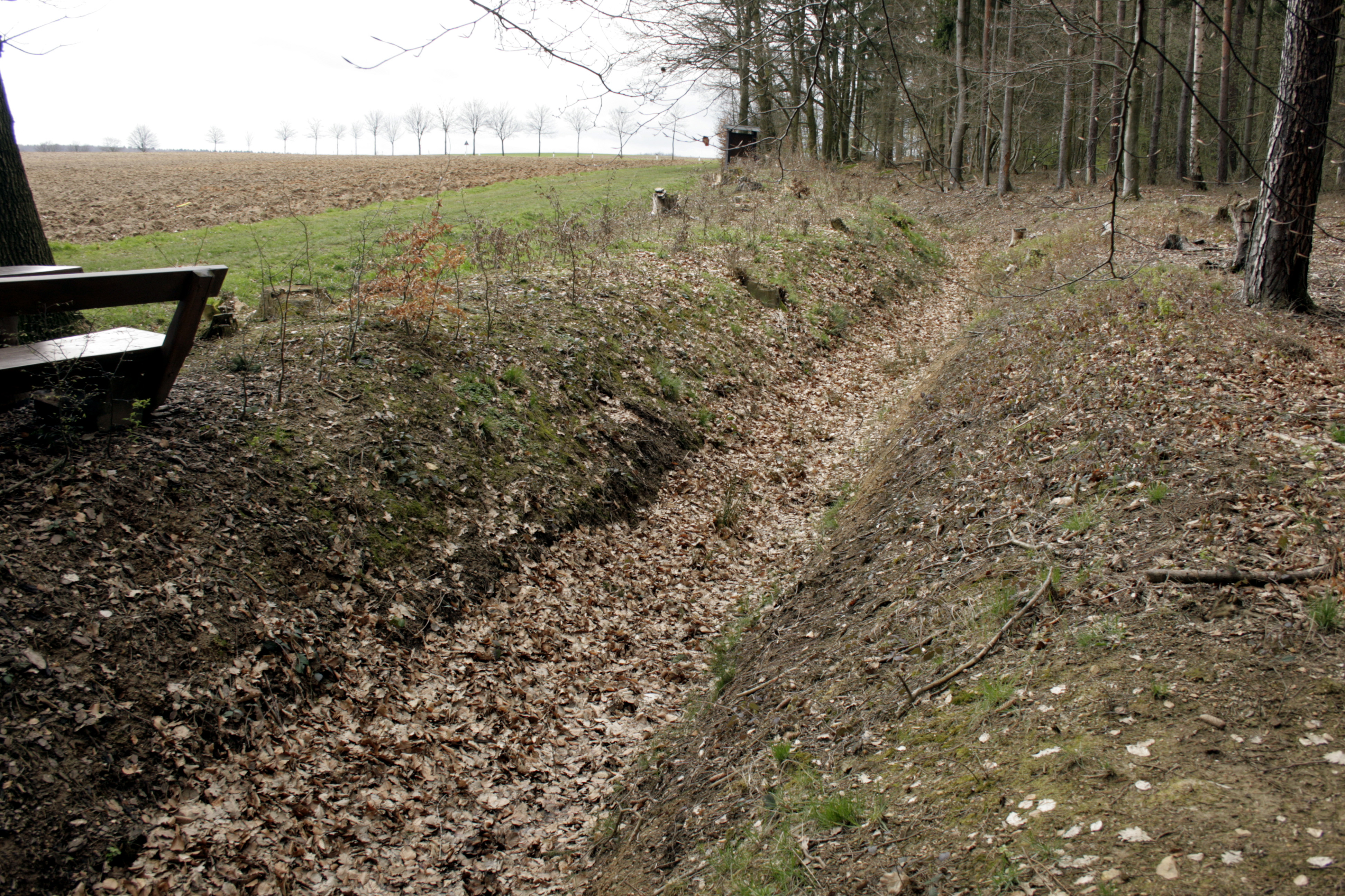 Rekonstruktion des Bechtheimer Gebücks bei Bechtheim, Deutschland